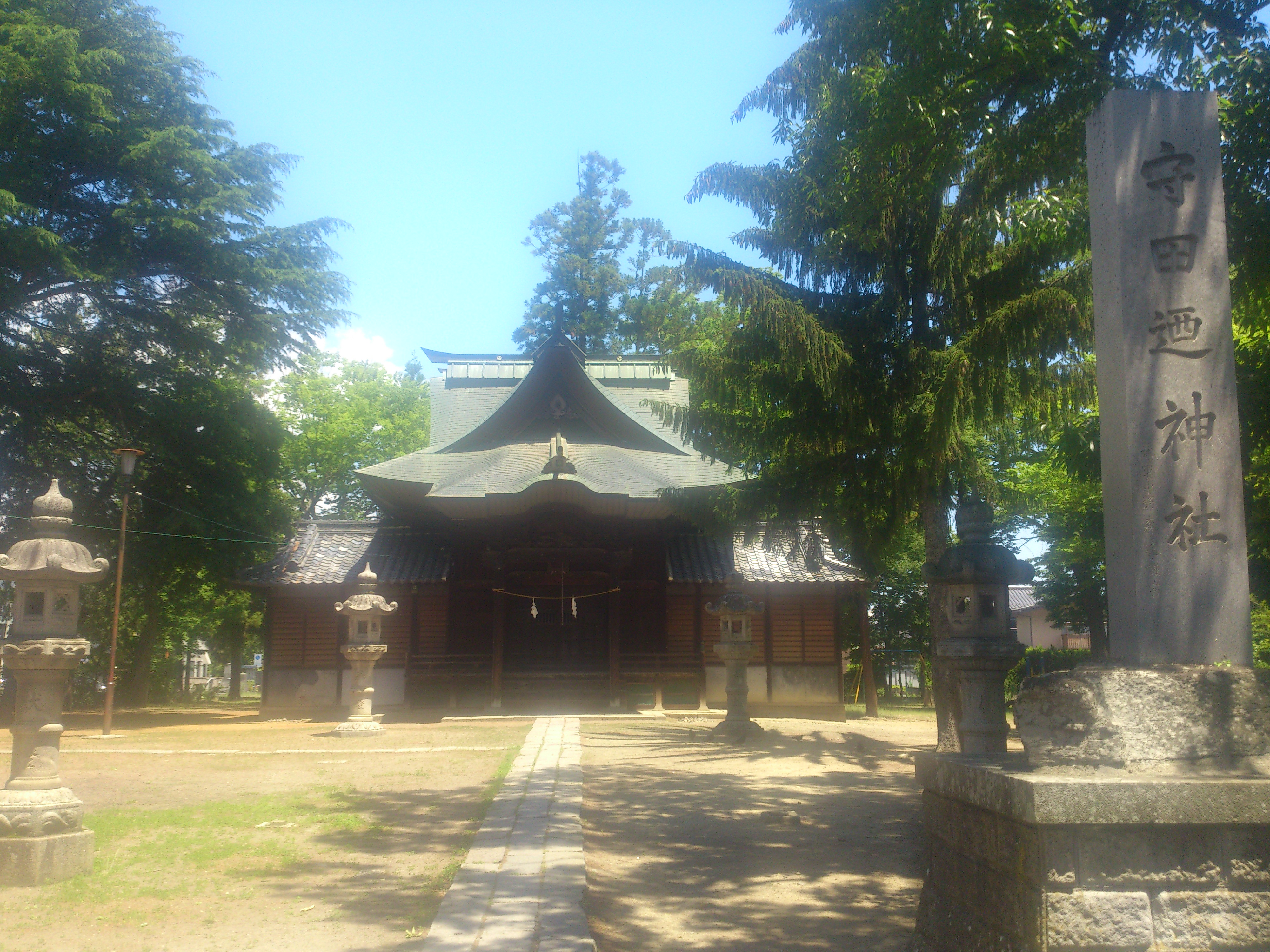 守田廼神社（長野県長野市高田）